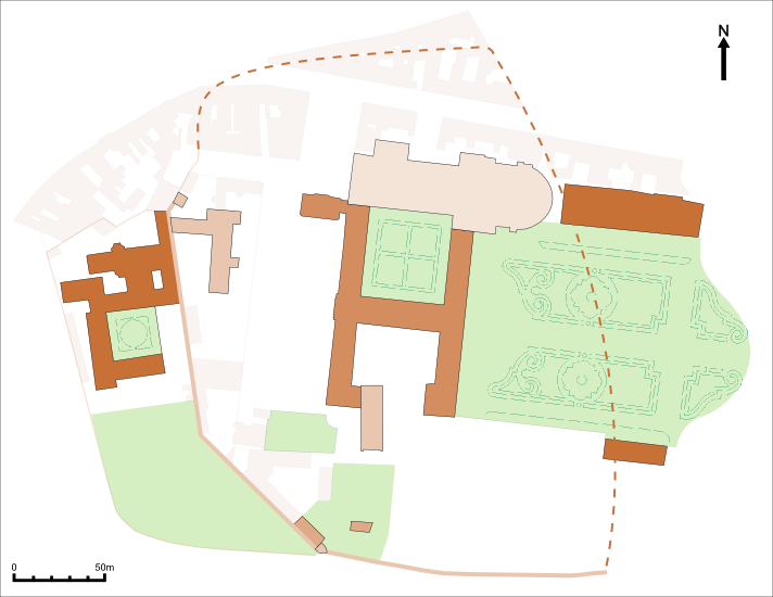 Plan de l'abbaye aux Hommes de Caen